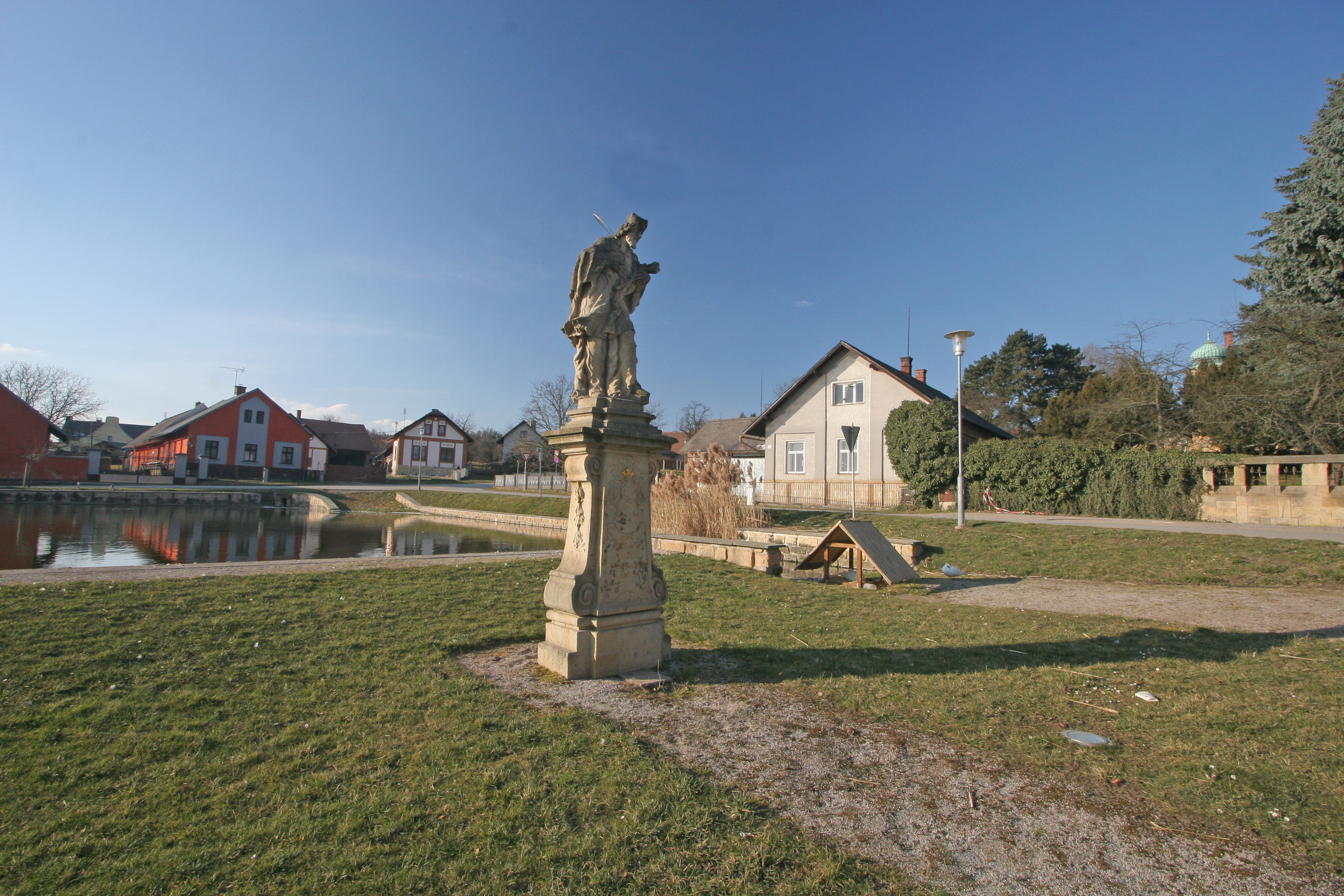 Sochy - sv. Jana Nepomuckého a soubor 4 soch alegorie ročních období (Holovousy), socha sv. J. Nep. na návsi u rybníka, pův. v parku, Holovousy